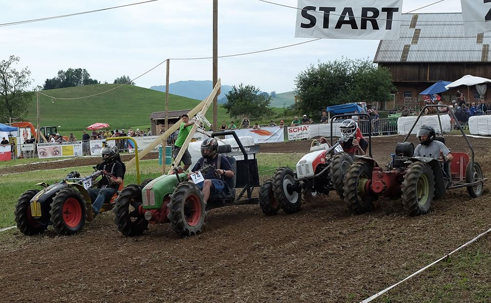 Vier Einachser beim Start am Einachserrennen 2014 in Schönenberg, Schweiz.